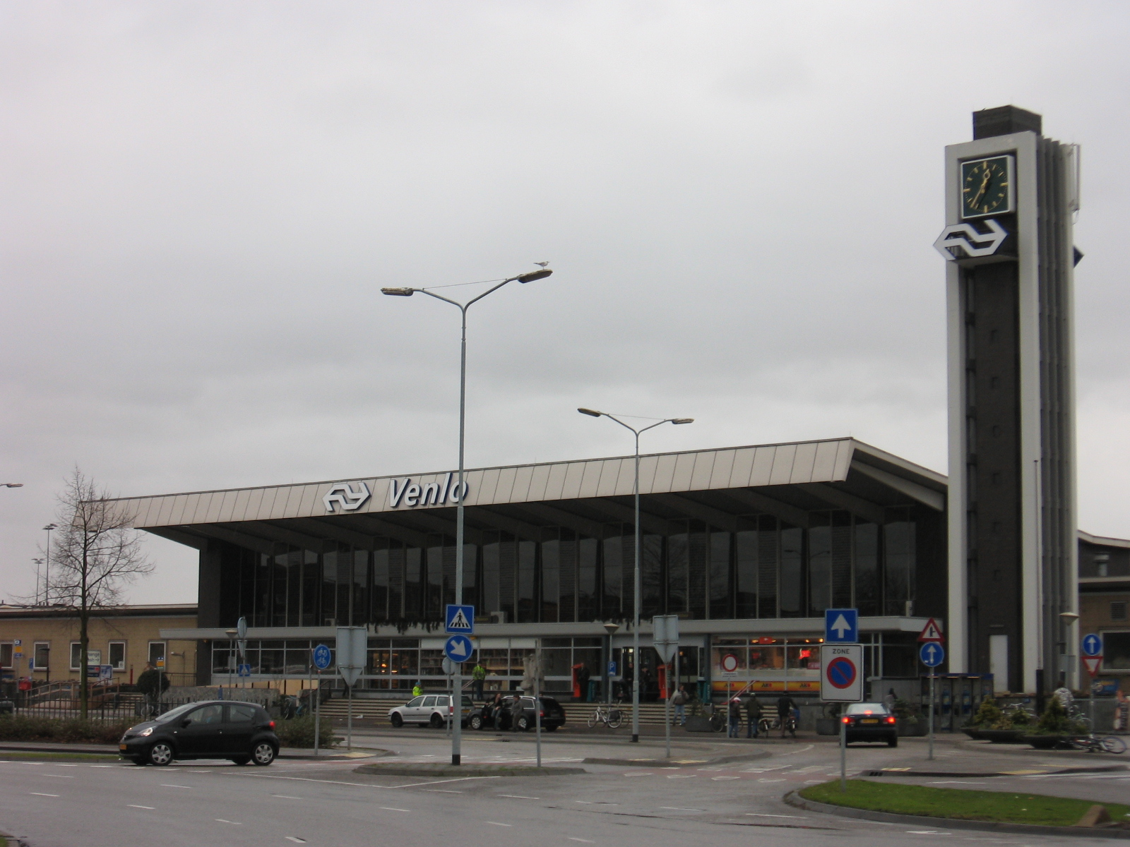 Venlo